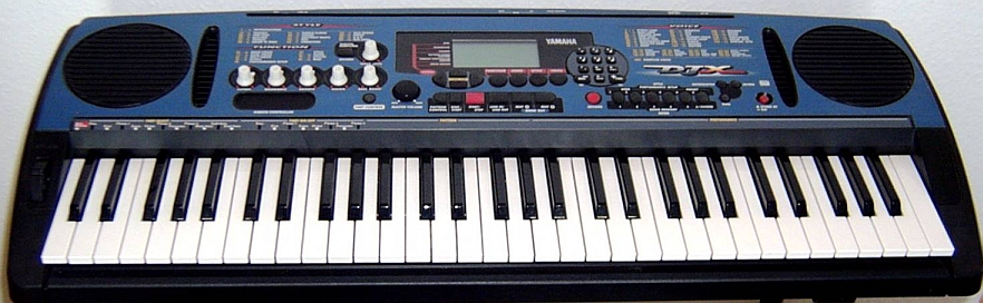 Yamaha DJX, Keyboard / Synthesizer